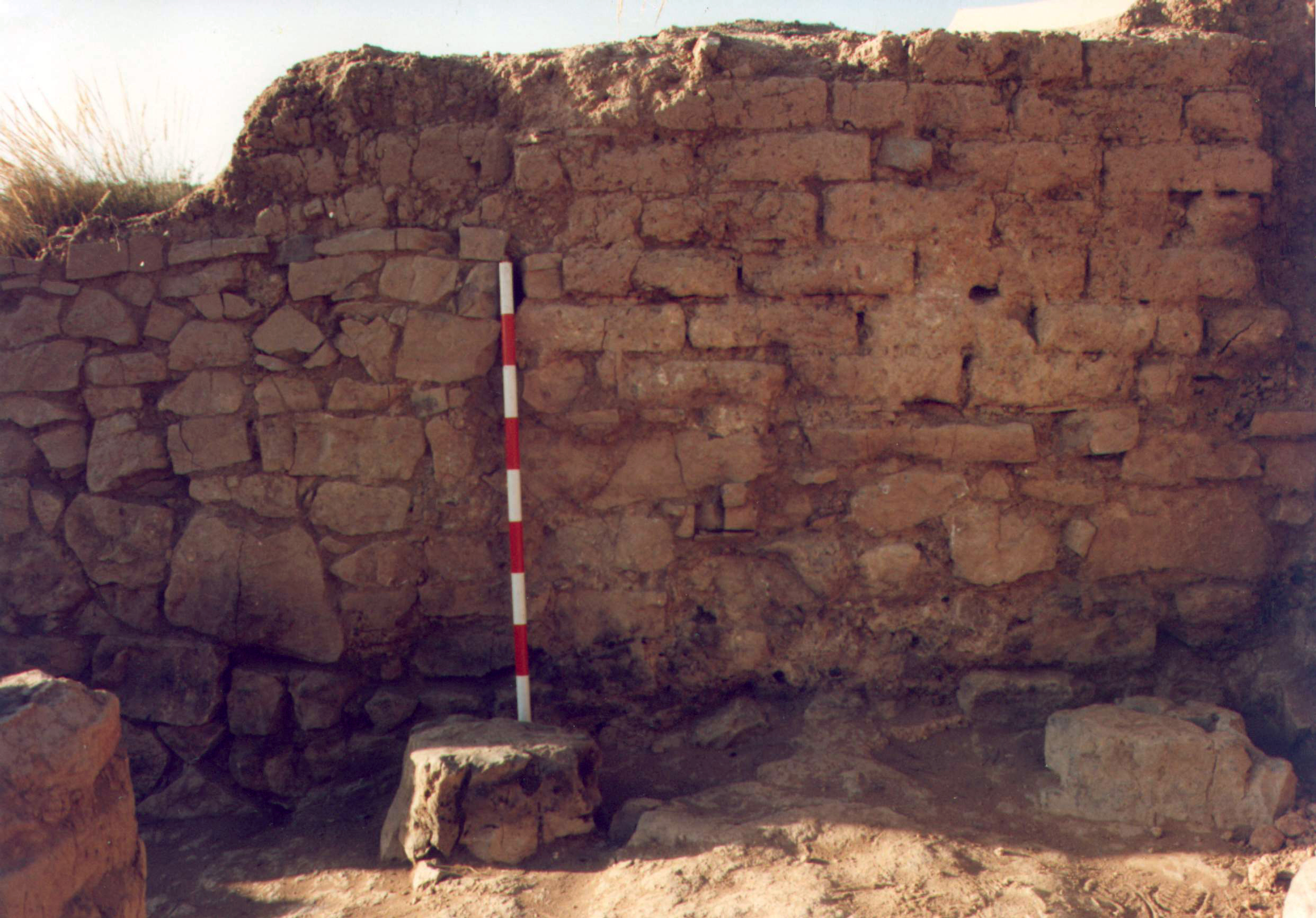 Muro de adobes del Castellet de Bernabe